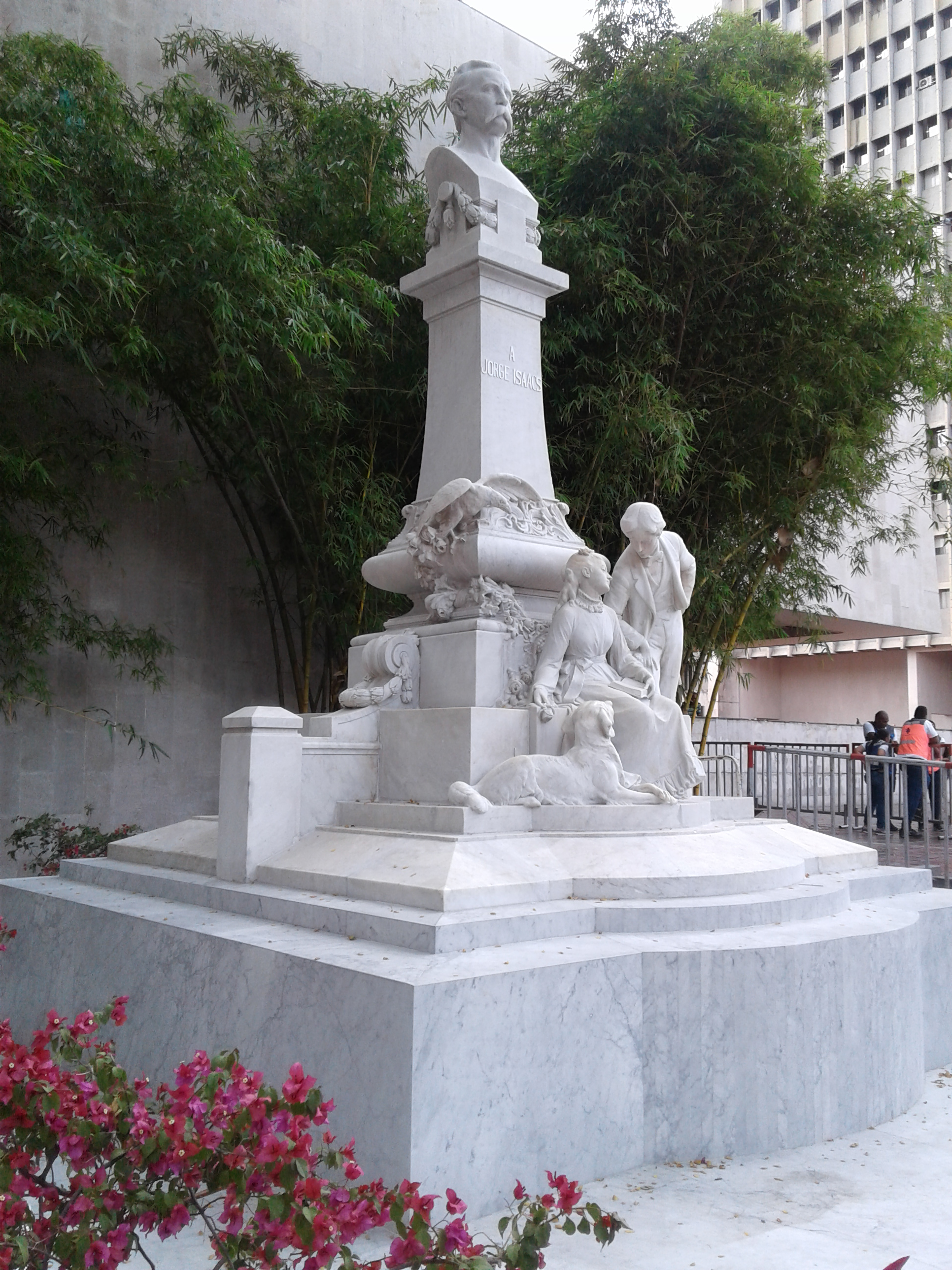 Monumento a Jorge Isaacs y La María que fue restaurado en 2018 Esta fotografía fue tomada en el municipio colombiano con código 76001.